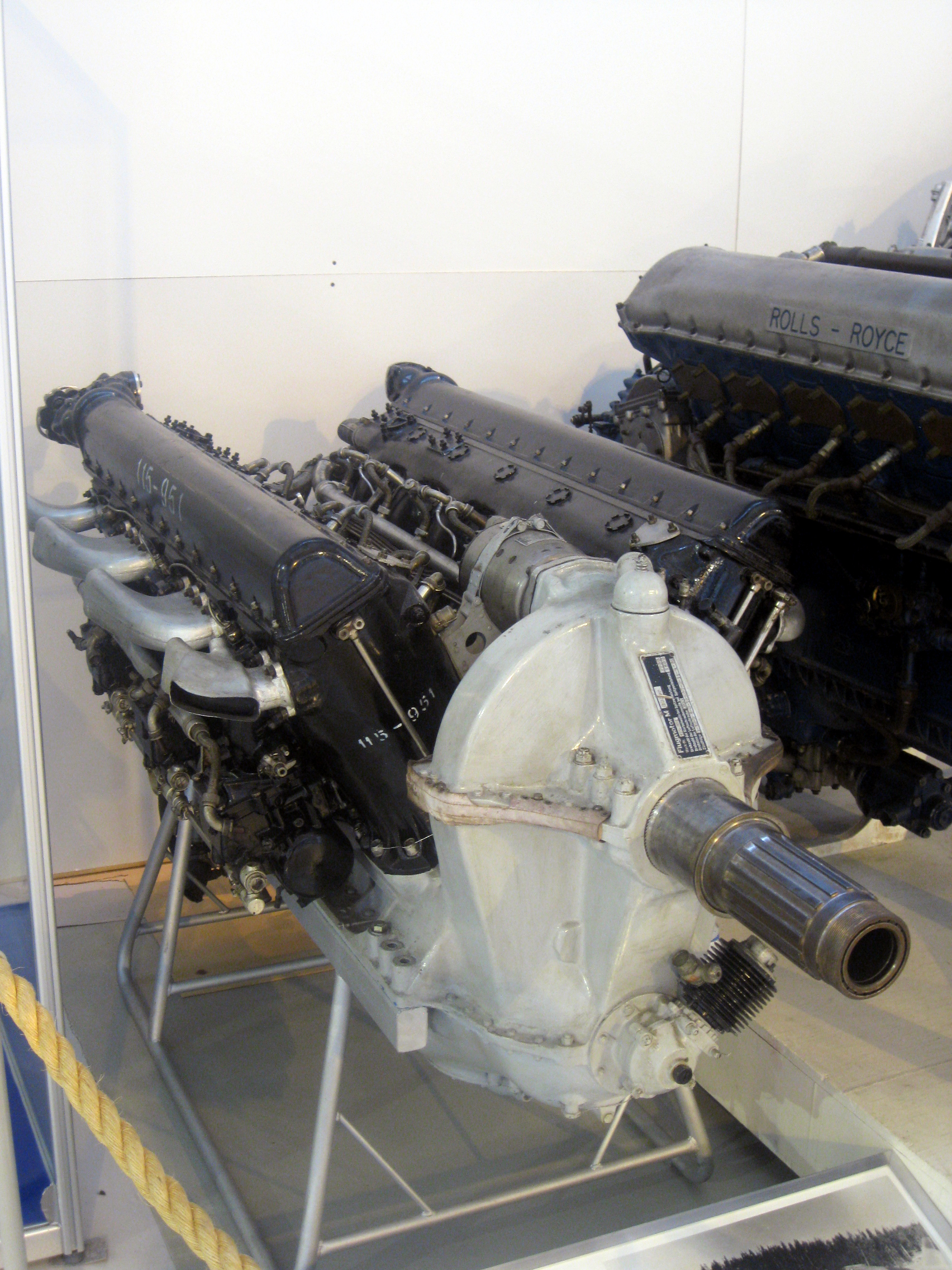 Klimov M-105 lentokonemoottori.